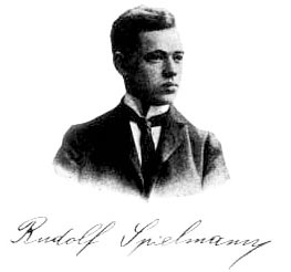 Rudolf Spielmann, jugador d'escacs